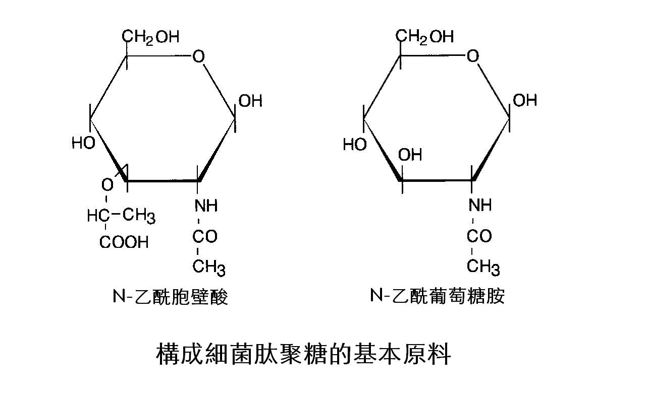 來自德文維基